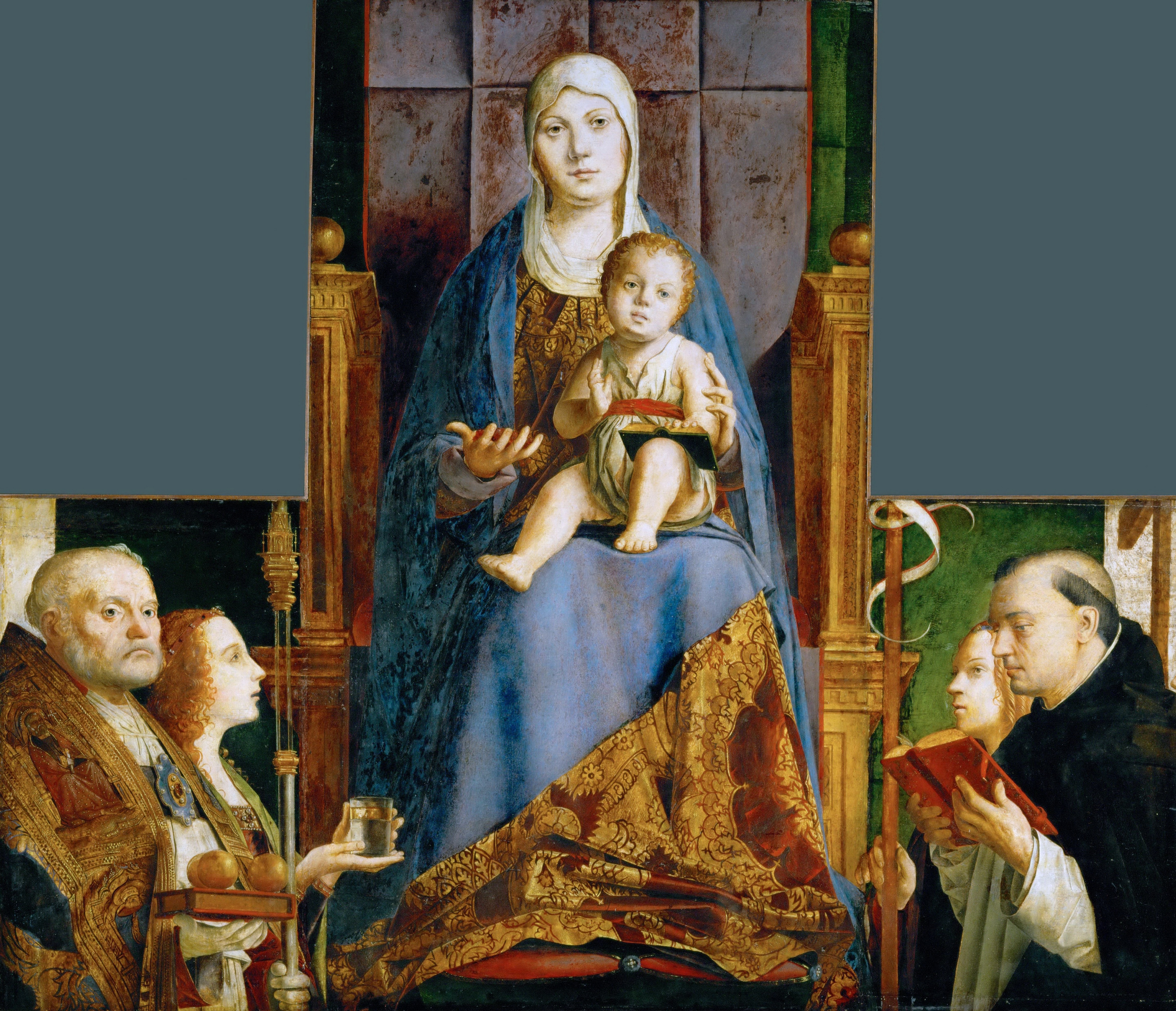 Fragmente der Altartafel mit thronender Madonna und vier Heiligen